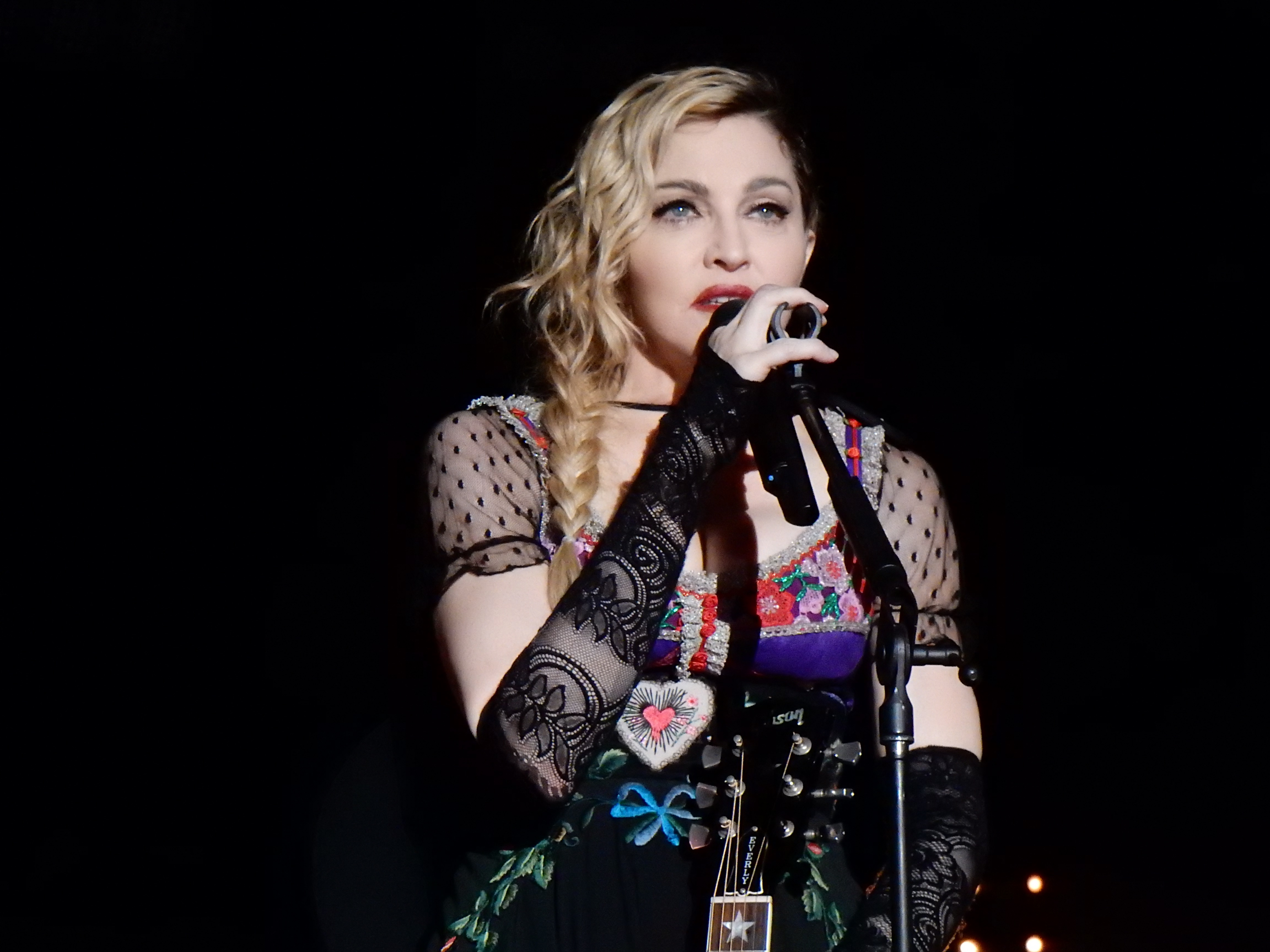 Madonna Rebel Heart Tour 2015 - Stockholm